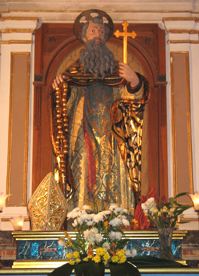 Giarratana (RG) - Statua di S. Antonio Abate, basilica omonima - Foto D. Pennisi